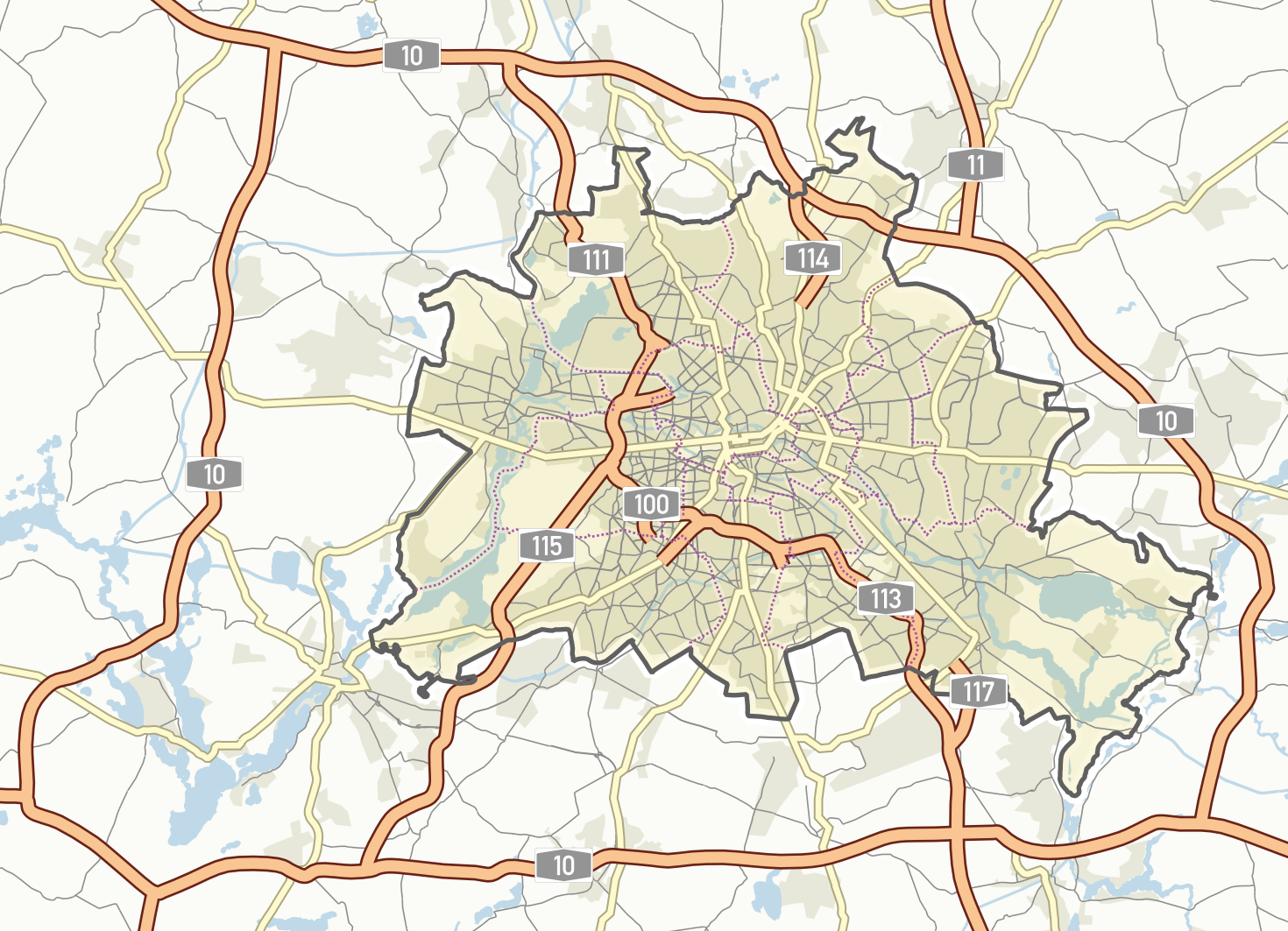 Berlin, Straßenverkehr Übersichtskarte